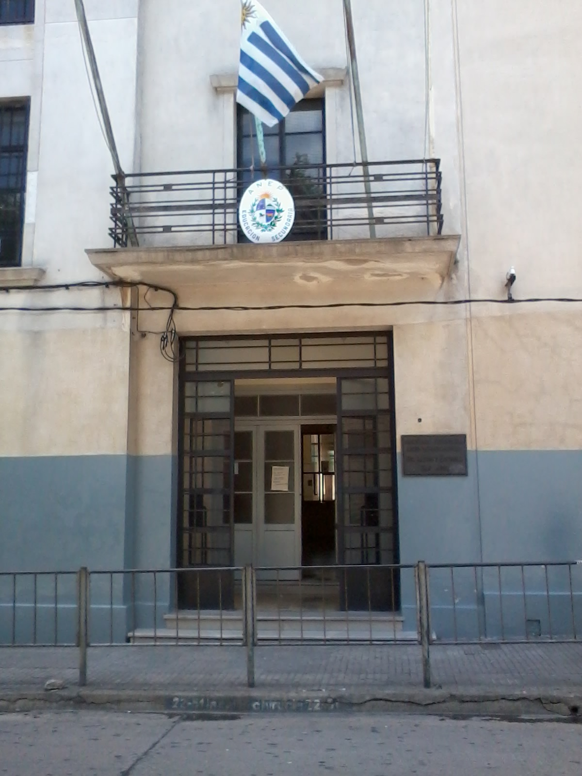 Sarandí Nº 624 Ciudad de San José de Mayo